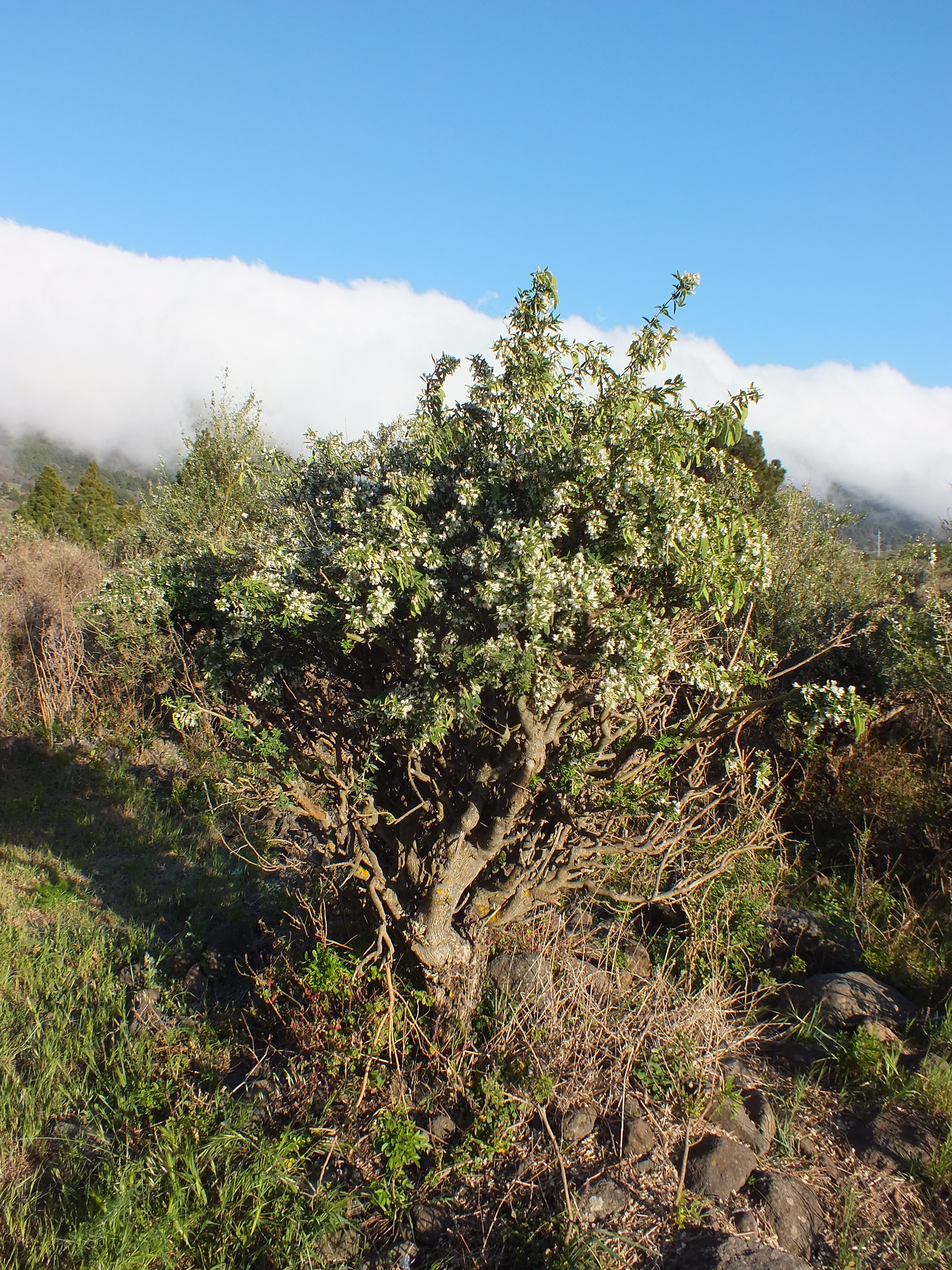 Arbusto de Chamaecytisus palmensis (Tagasaste) en la Isla de La Palma, Islas Canarias.